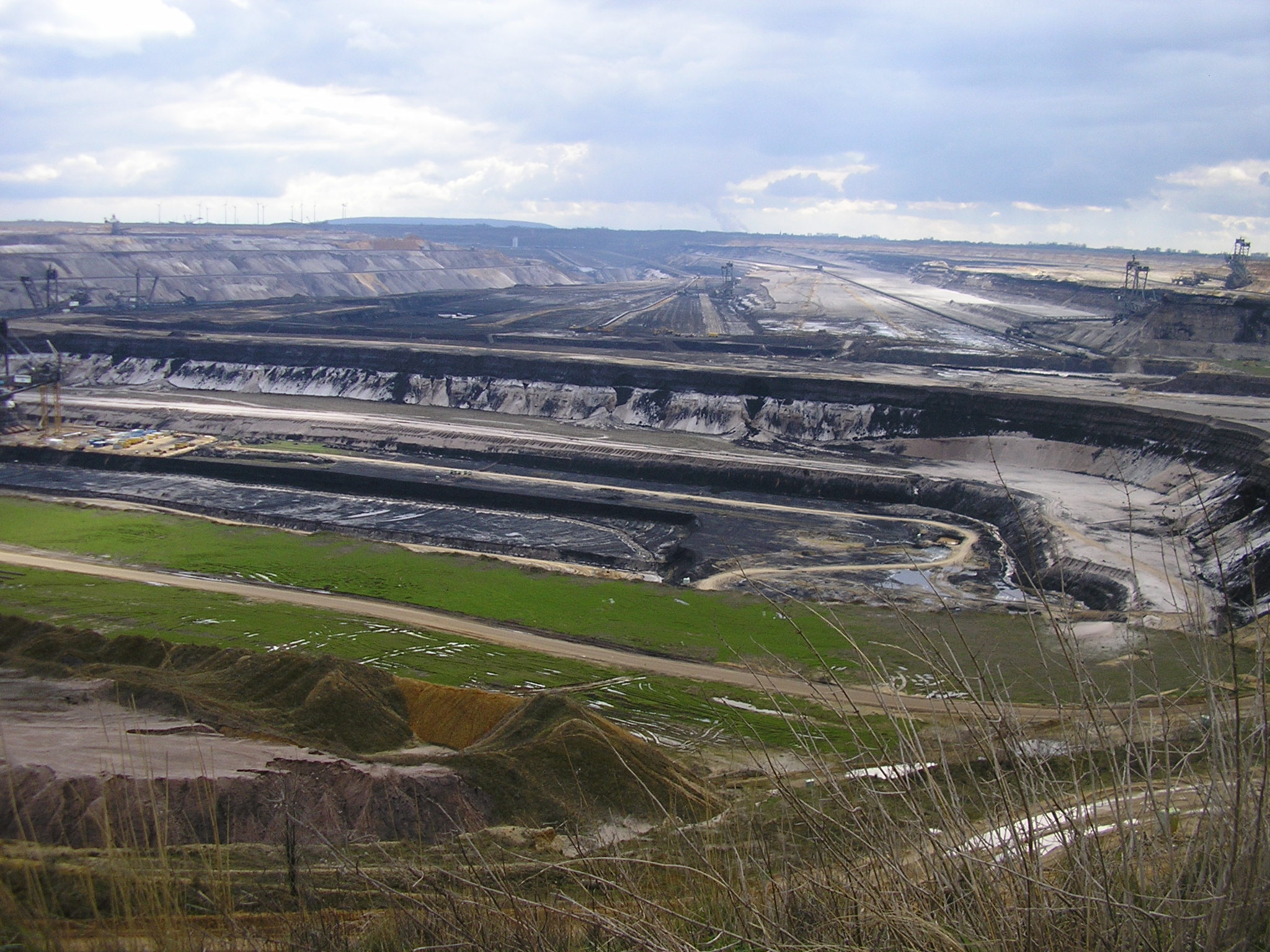 Tagebau Garzweiler